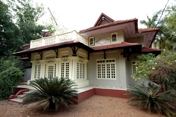 Old style house in Kaippattoor